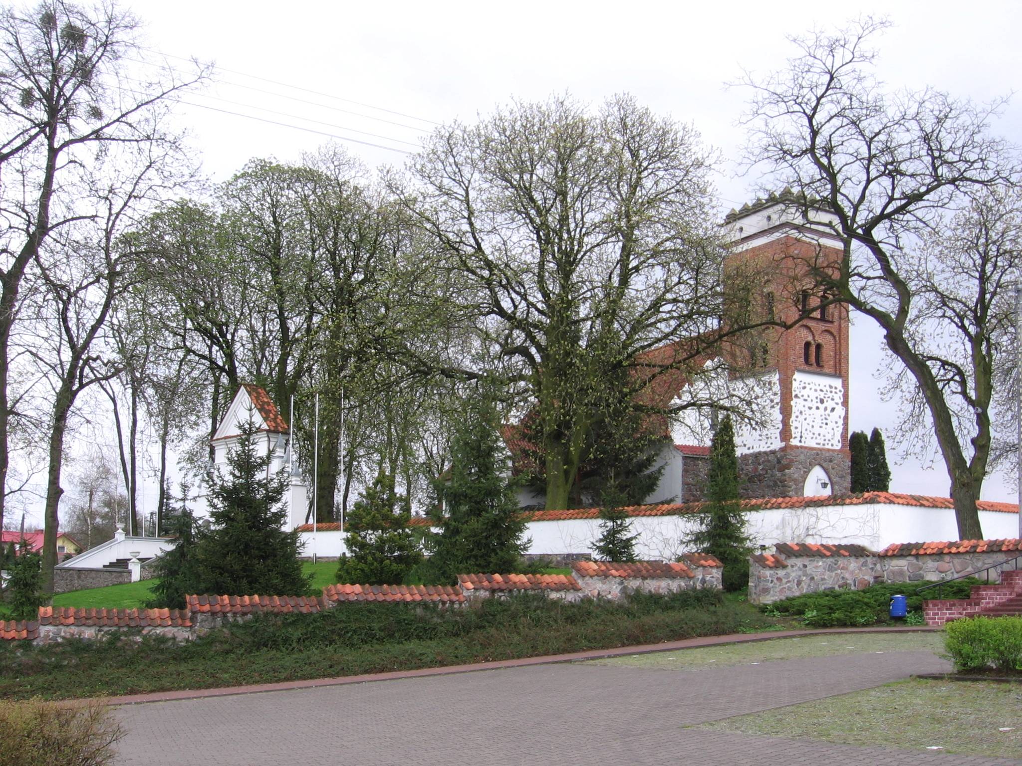 Strzygi 10 - rzymskokatolicki kościół parafialny pw. św. Stanisława Biskupa, XIV, XVII